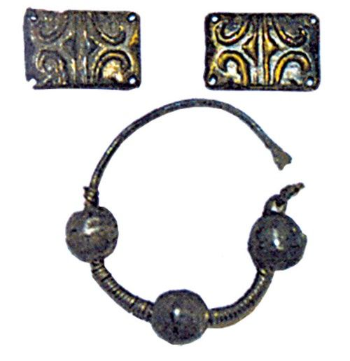 Вісочнае кальцо, бляшкі-накладкі ад налобнага венчыка. Каляровы метал. Могільнік Малевічы Вілейскага раёна (Міншчына). Раскопкі Людмілы Дучыц